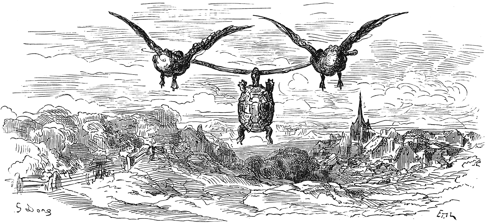 grafika z książki PL Bajki, Jean de La Fontaine, nakładem i drukiem Jana Noskowskiego, Warszawa 1876